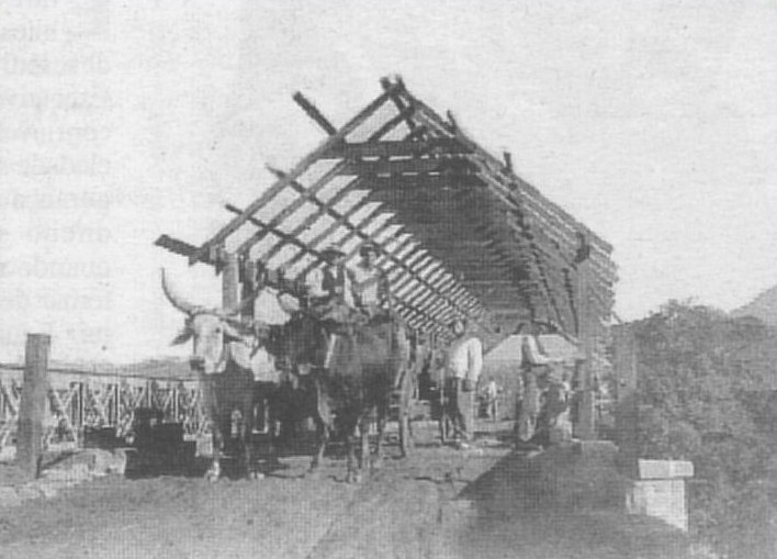 igrejinha em 1935